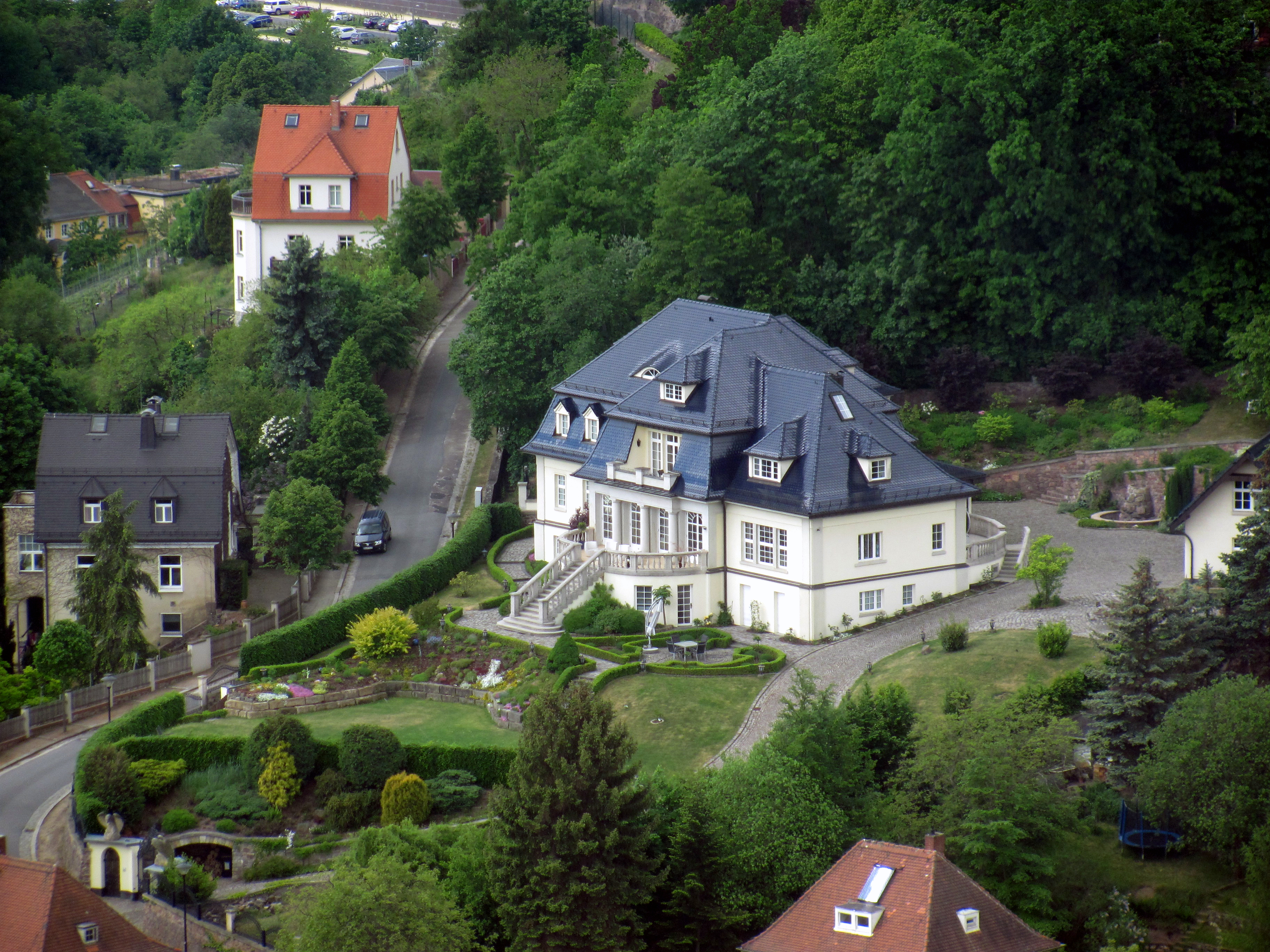 Radebeul, Landhaus Franz Hartung, vom Wasserturm aus